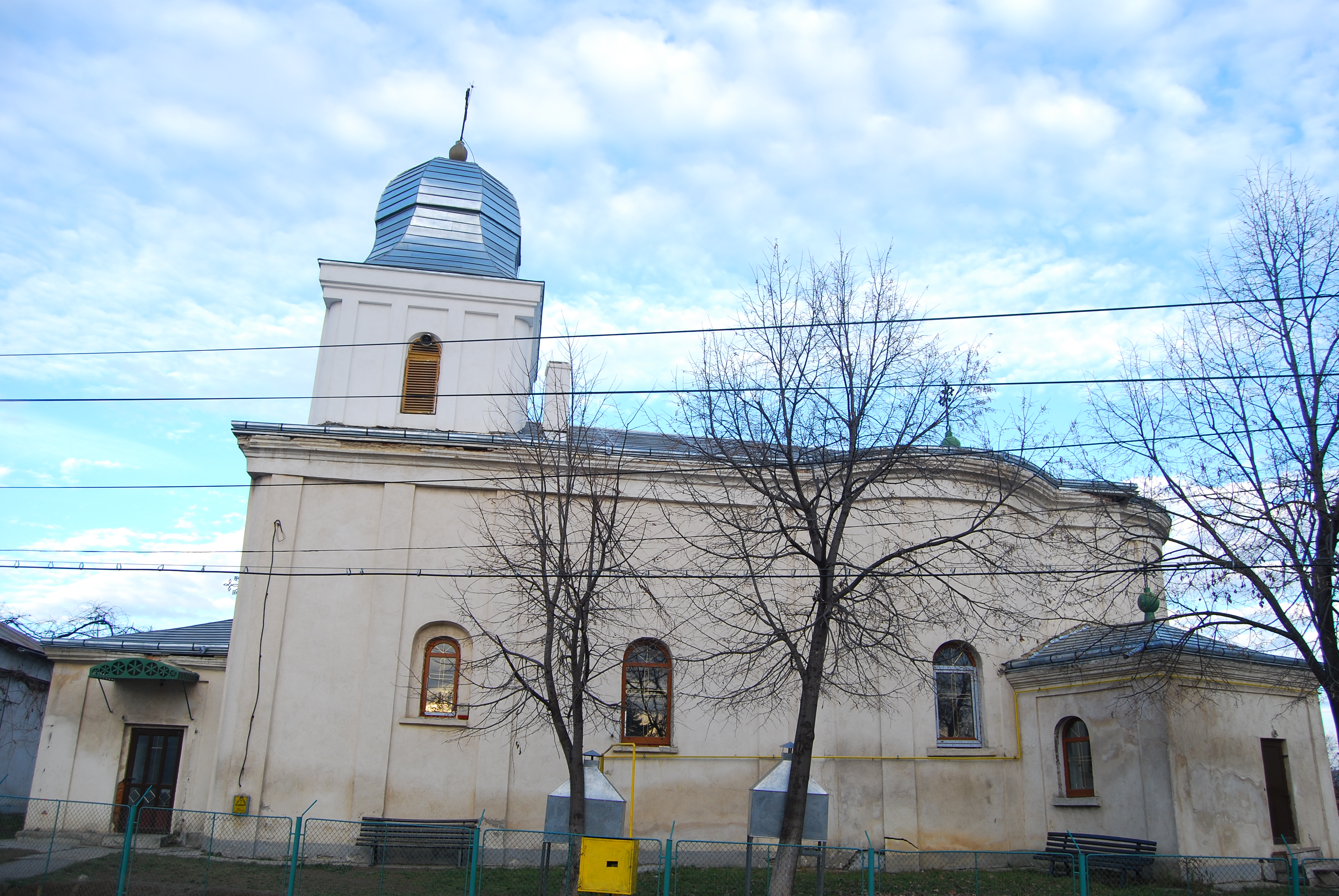 Biserica "Adormirea Maicii Domnului", "Sf. Antonie" (Biserica Vulpe)